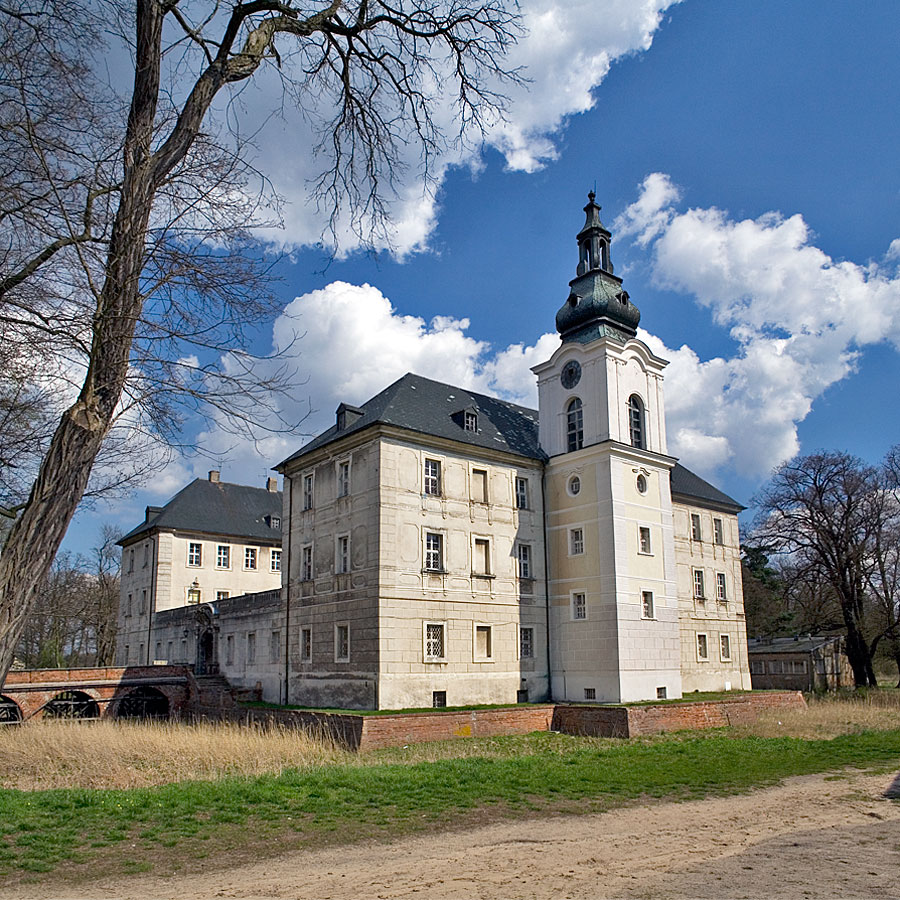 Zámek v Zabóru, Polsko